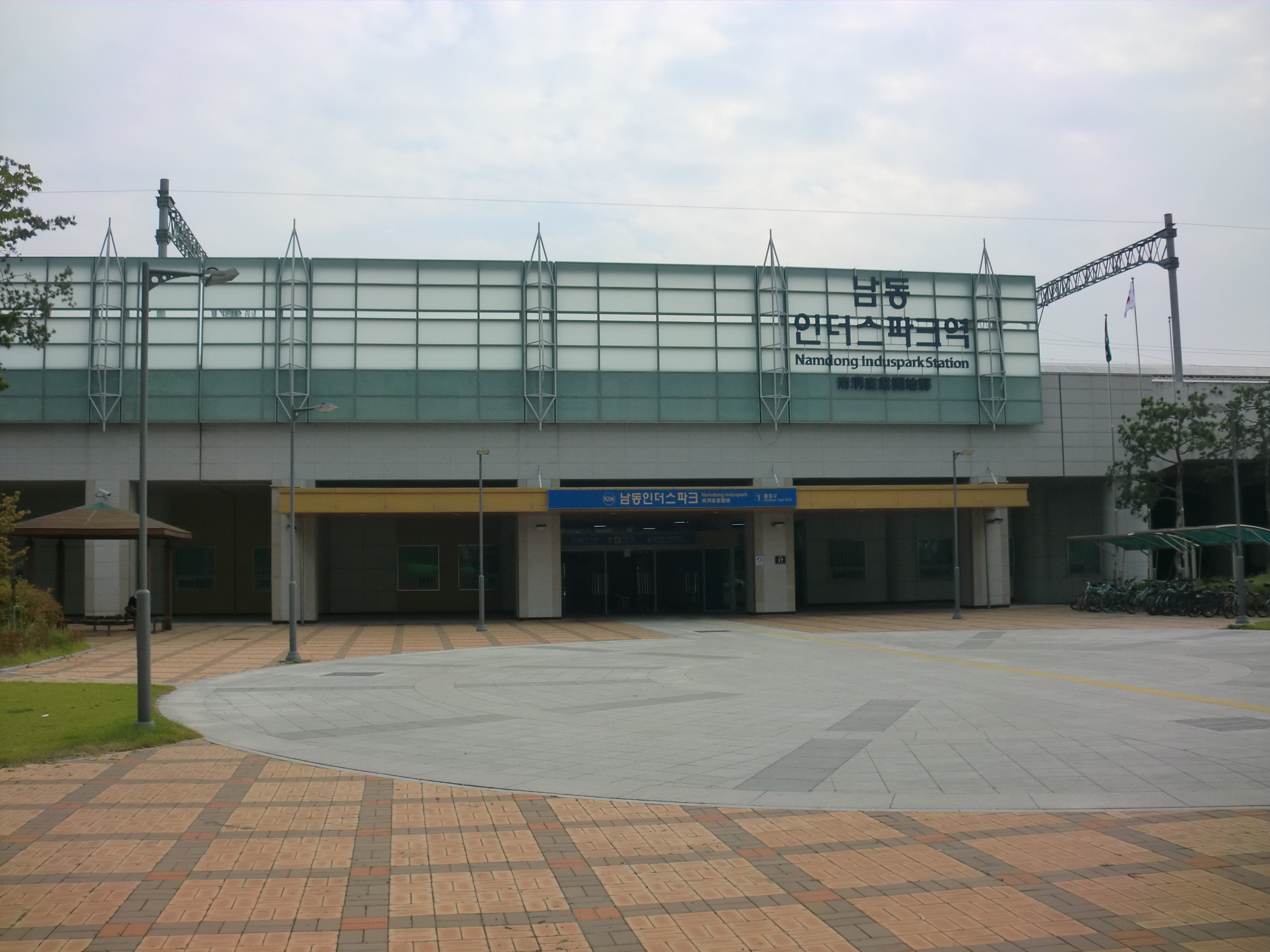 수인선 남동인더스파스역 1번출구